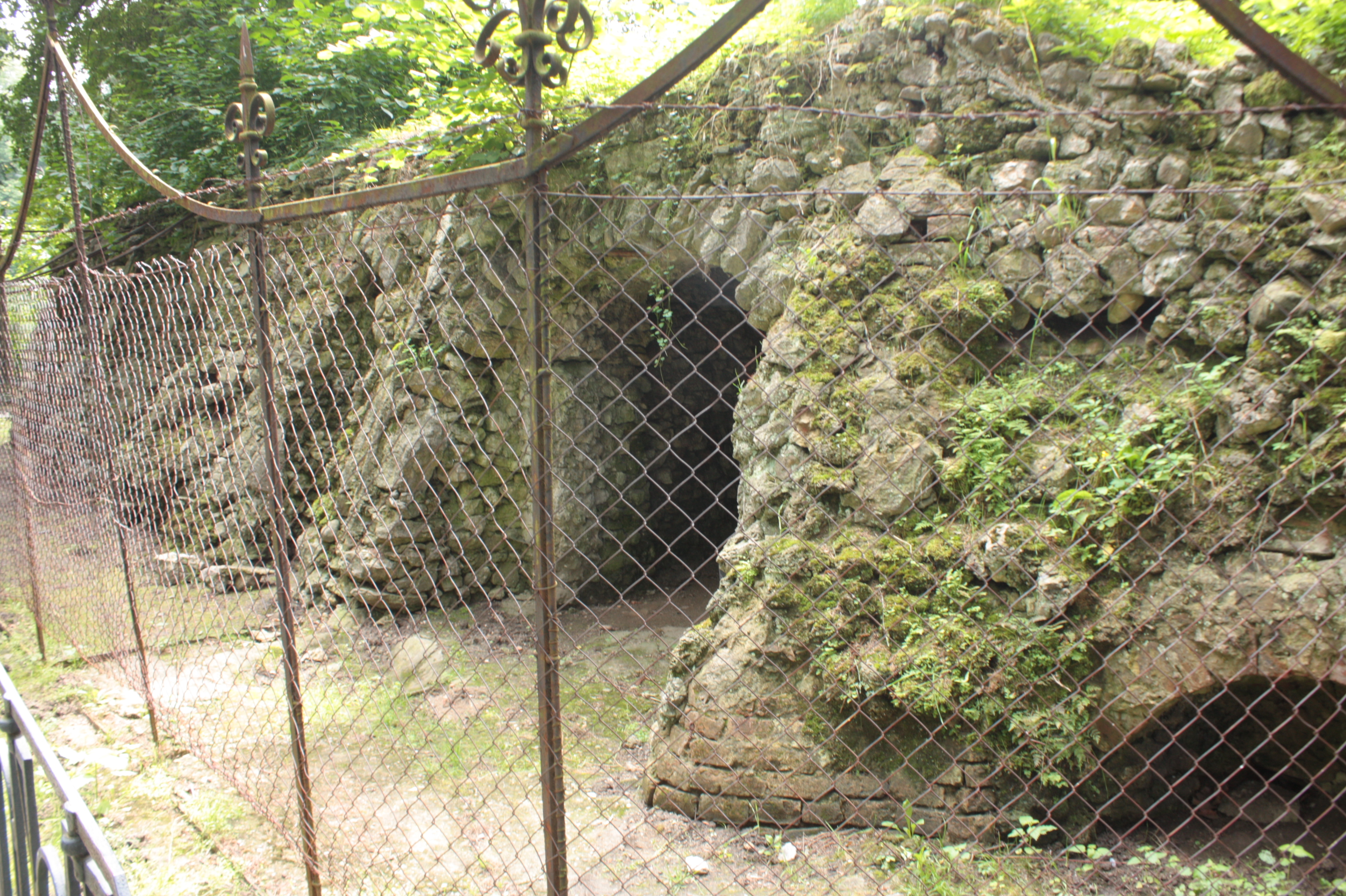 Podzámecká zahrada v Kroměříži